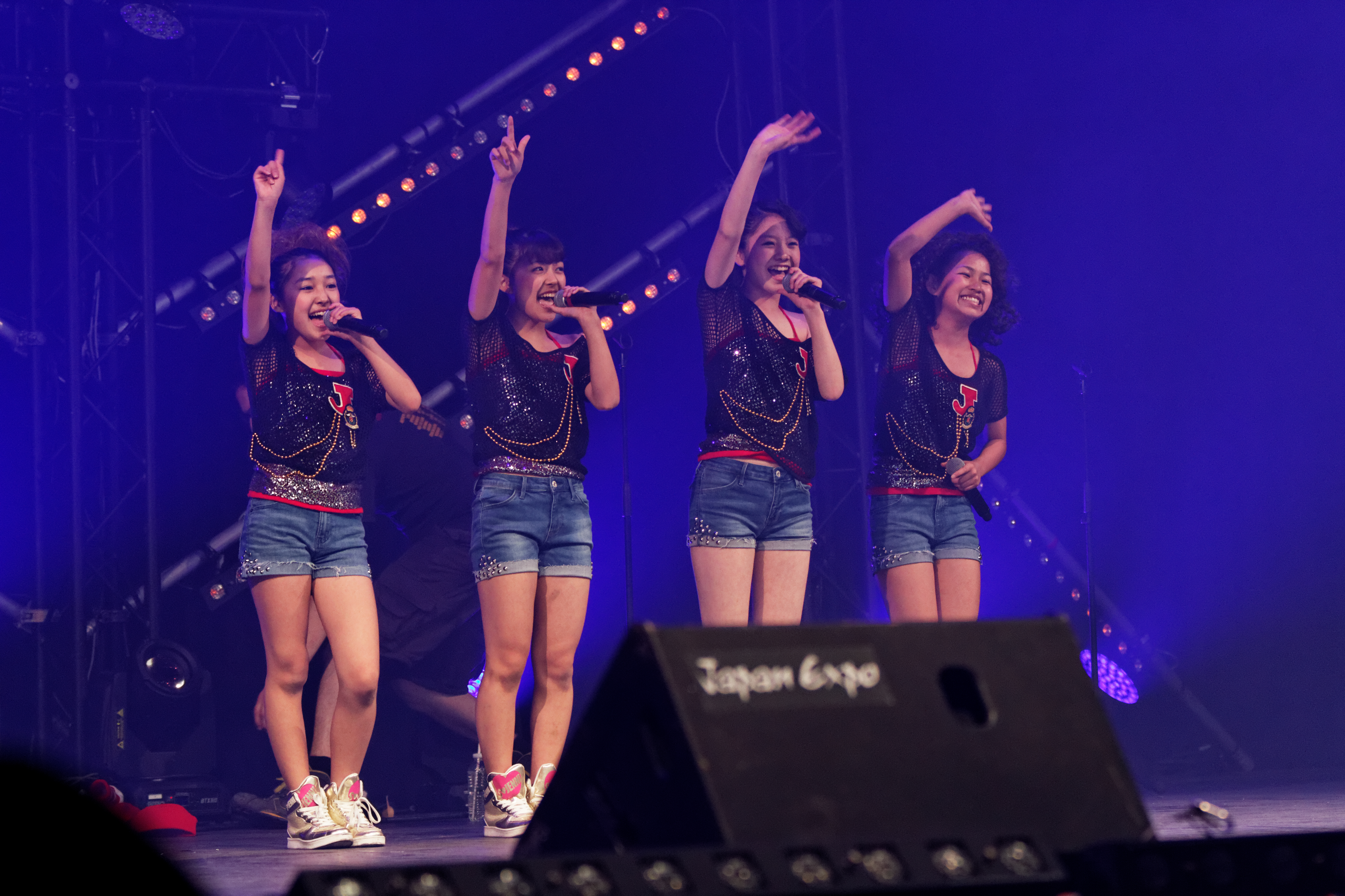 J☆Dee'Z en concert lors du live house du Japan expo Paris 2013.